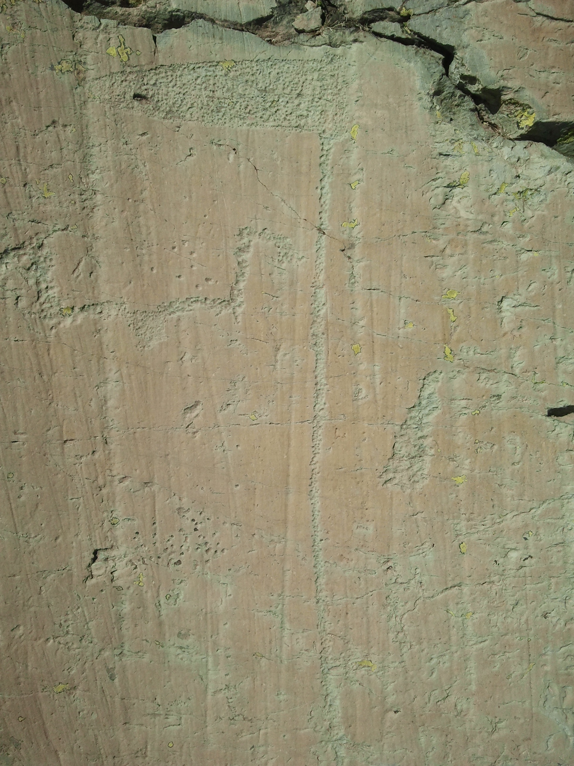 Gravures rupestres de la vallée des Merveilles (Classé Inscrit). Hallebarde .